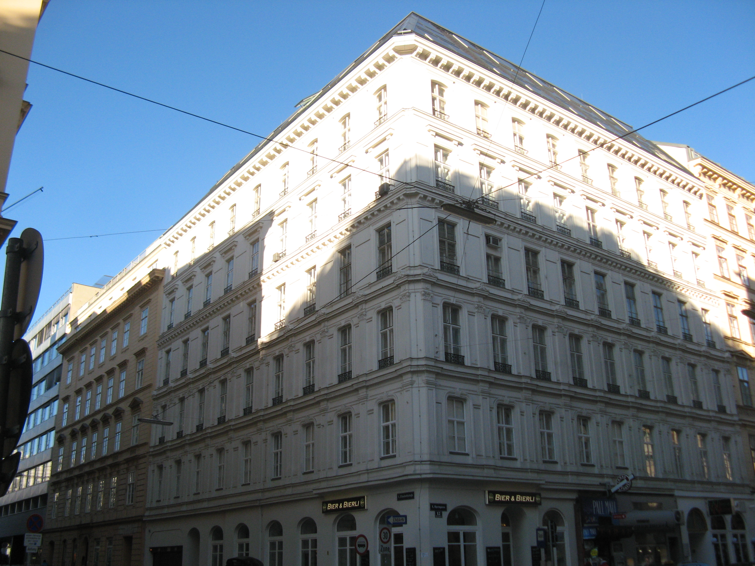 Eckhaus (1861-62) von Johann Romano und August Schwendenwein, Elisabethstraße 8, Wien-Innere Stadt